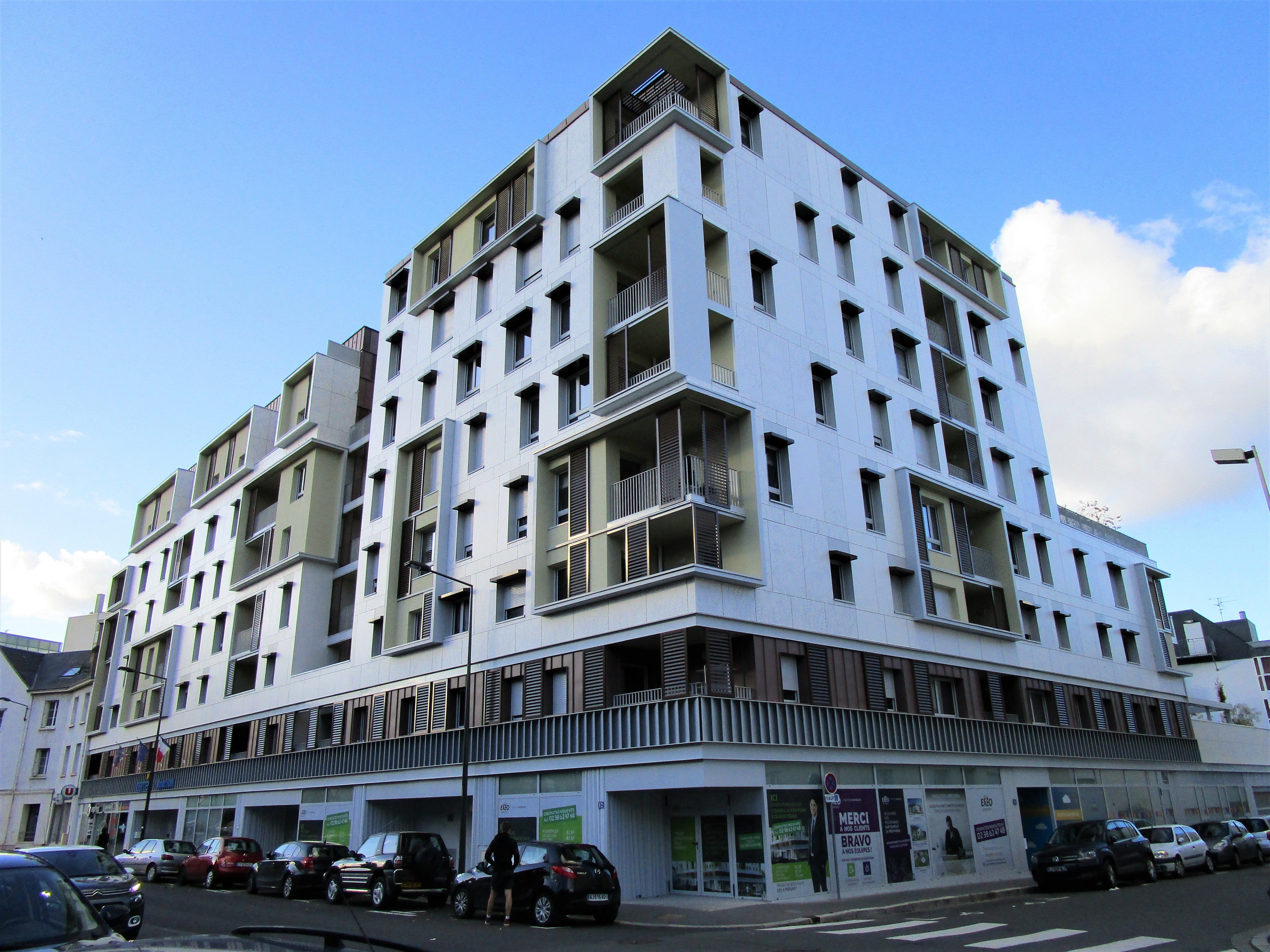 Immeuble sur la rue Marcel Tribut dans le quartier Velpeau de Tours.